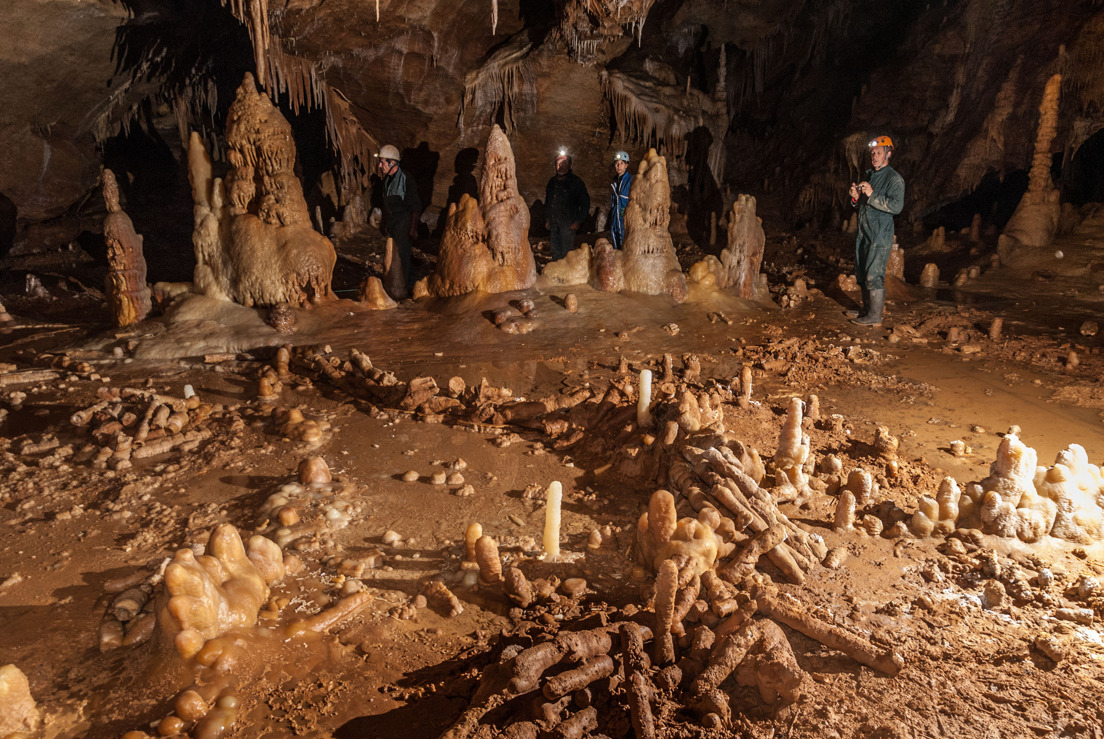 Structure aménagée par l'homme, il y a 176.500 ans, au fond de la grotte de Bruniquel, à partir de 400 stalgmites brisées et rangées.